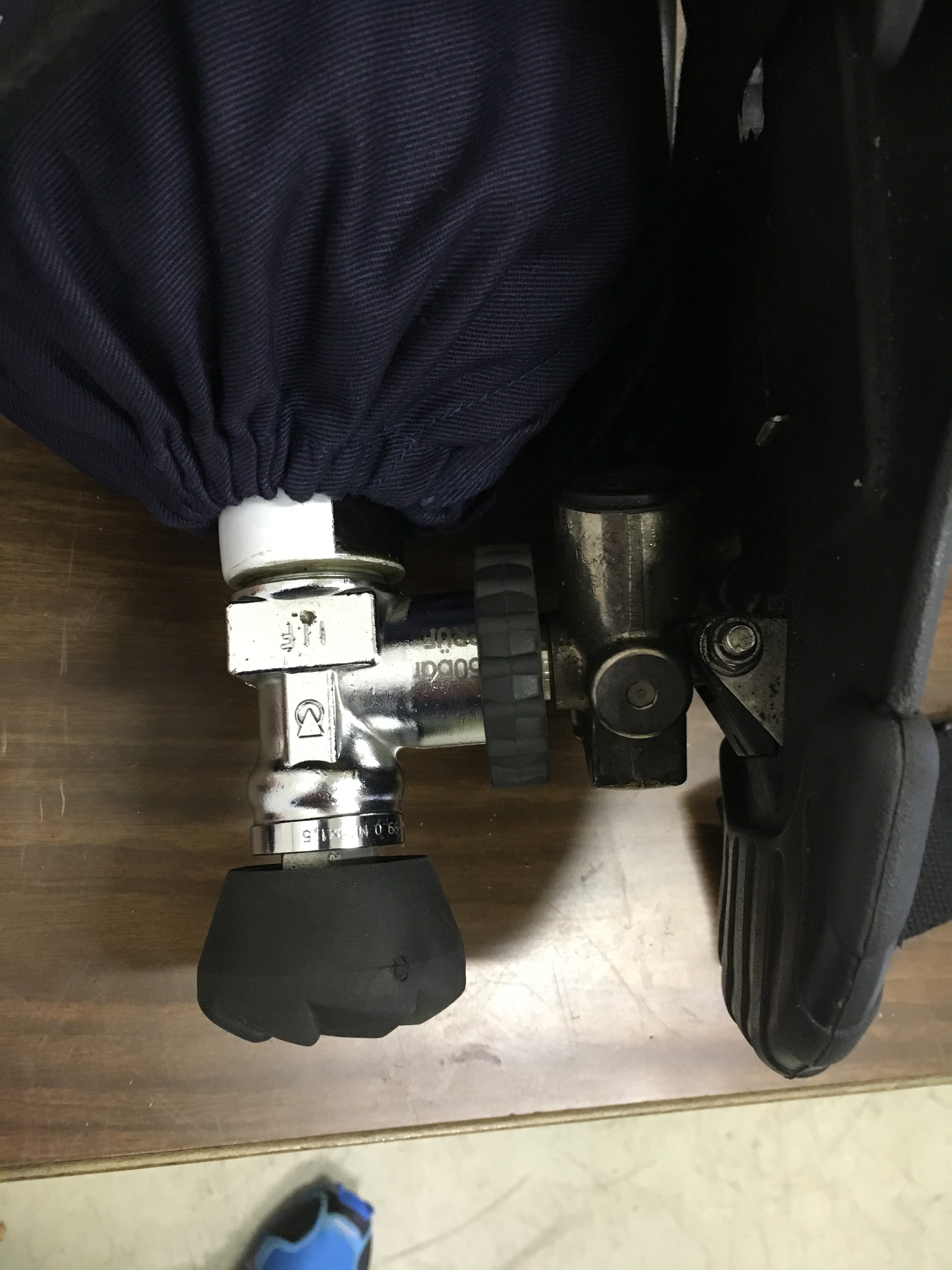 Na sliki je viden reducirni ventil in ventil za odpiranje in zapiranje jeklenke